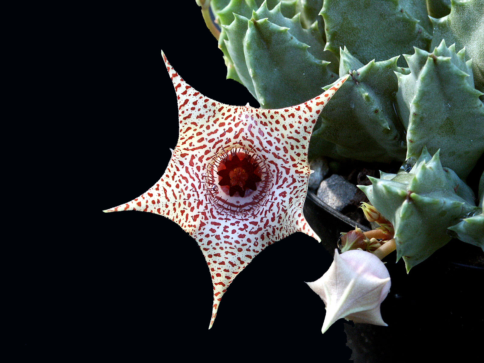 Huernia